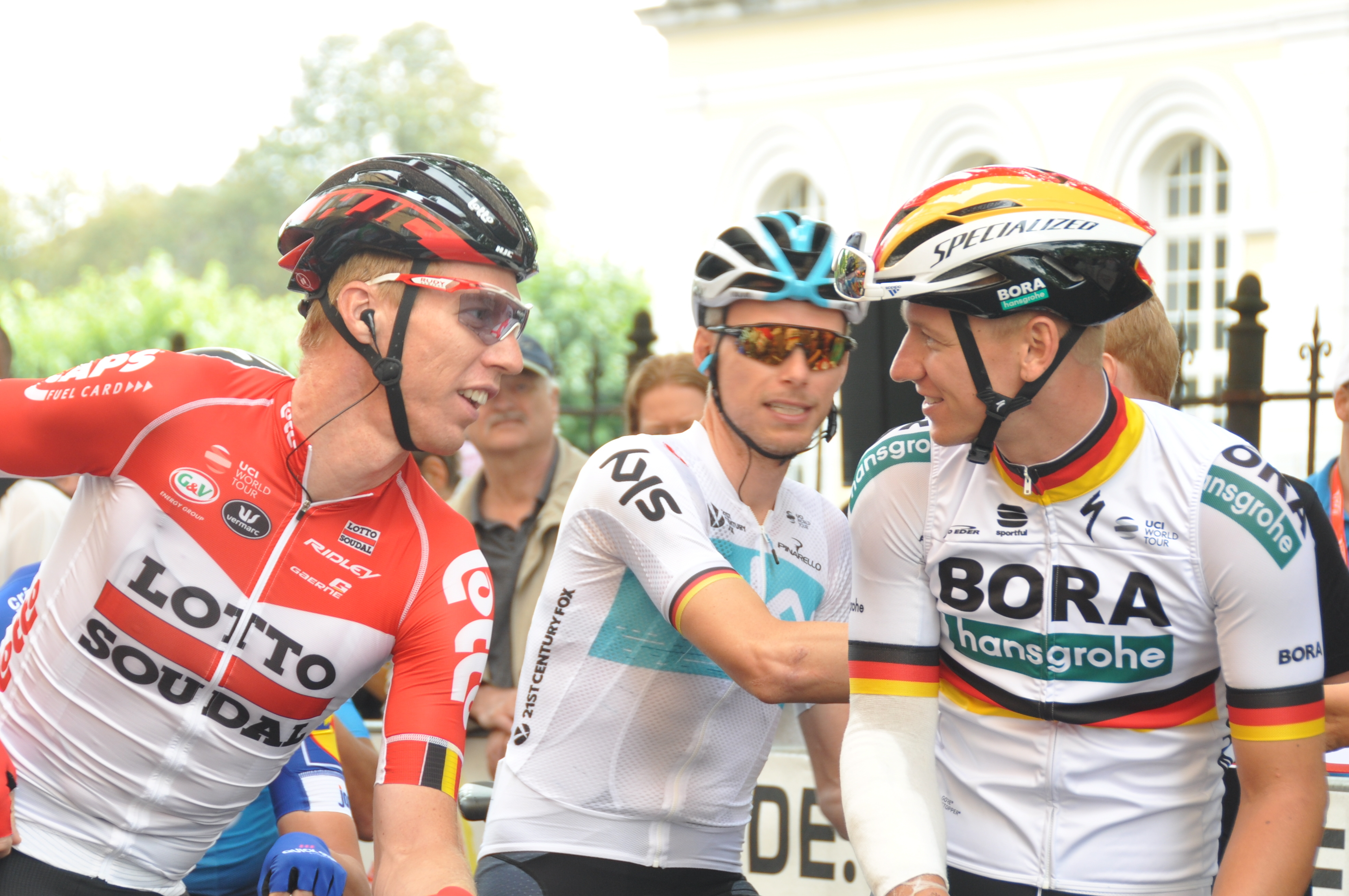 Marcel Sieberg, deutscher Radrennfahrer, Christian Knees, Pascal Ackermann, deutscher Radrennfahrer